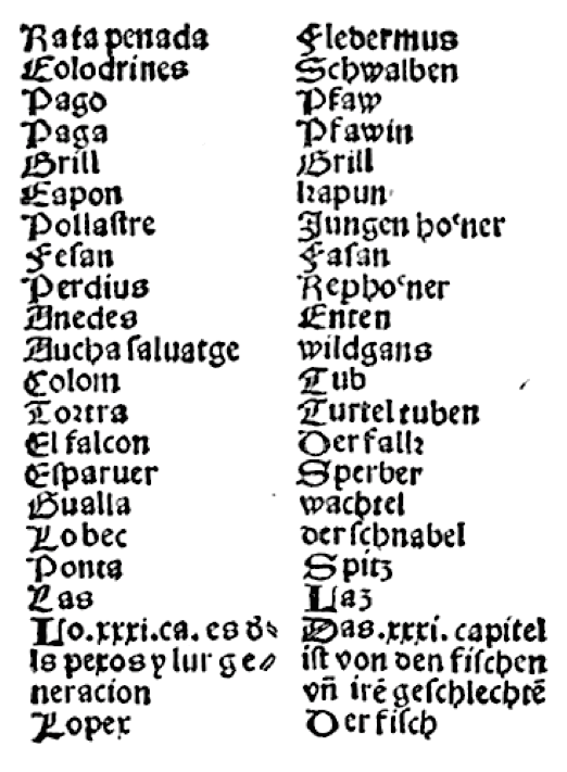 Adaptació de la reproducció de pàgina del llibre "Vocabulari molt profitos per apendre Lo Catalan Alamany y Lo Alamany Catalan" de Joan Rosembach (any 1502)